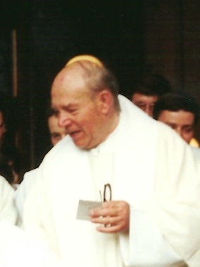 Bernard František Palka v roce 1996